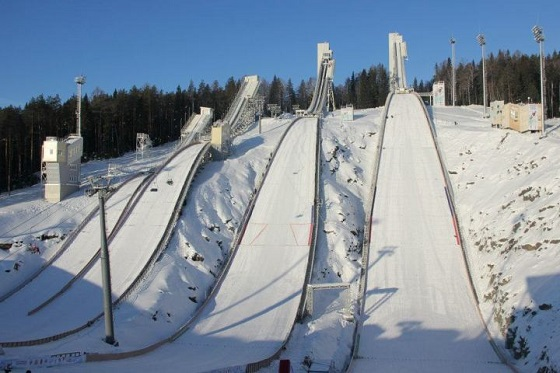 tagiil 76